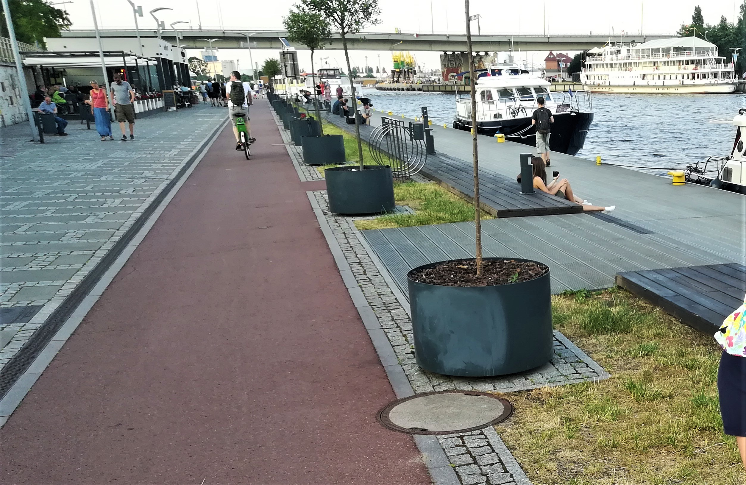 Nabrzeże Wieleckie w Szczecinie (Odra).